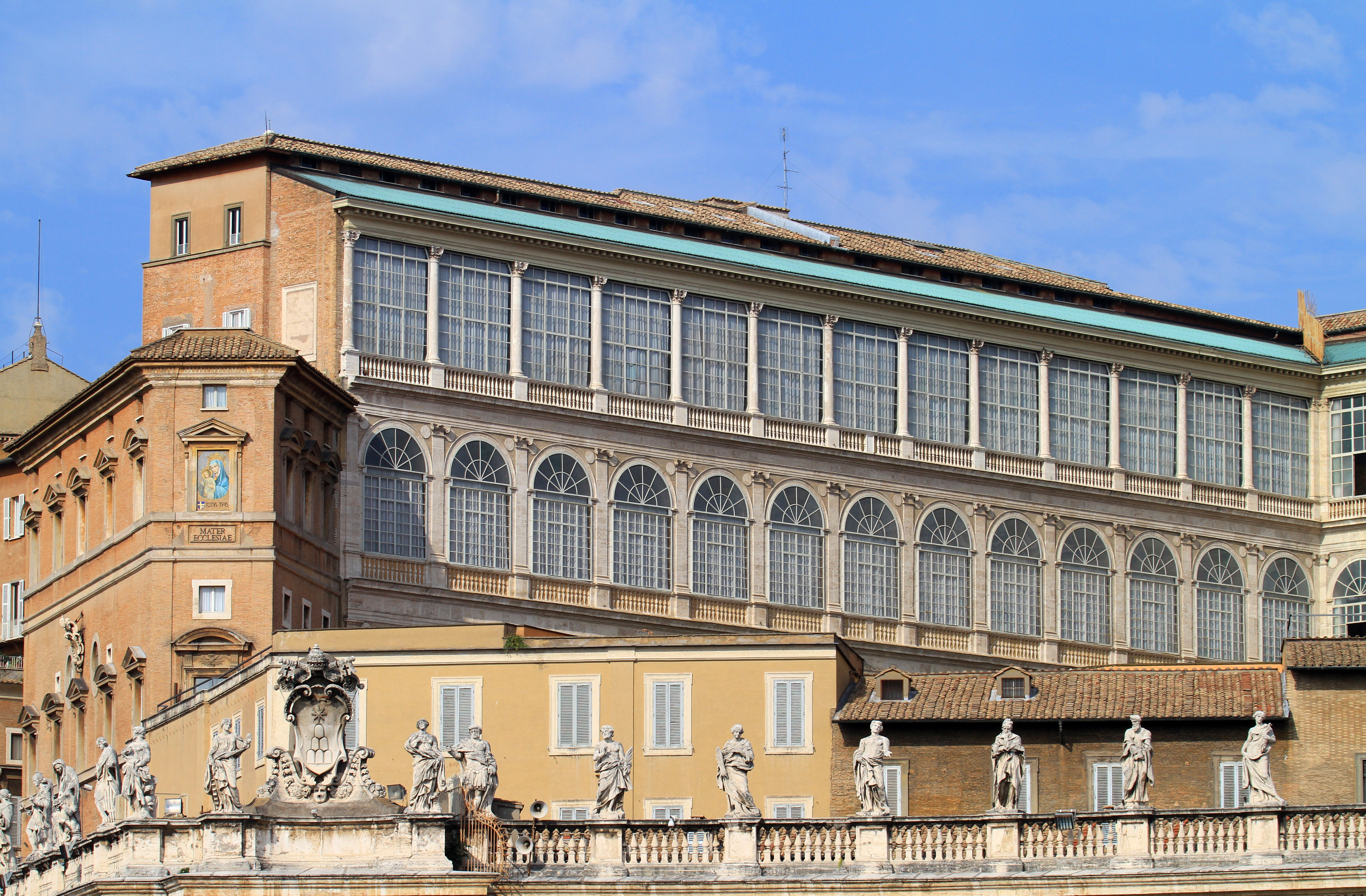 Roma, Città del Vaticano: Loggia di Raffaello nel Palazzo Apostolico